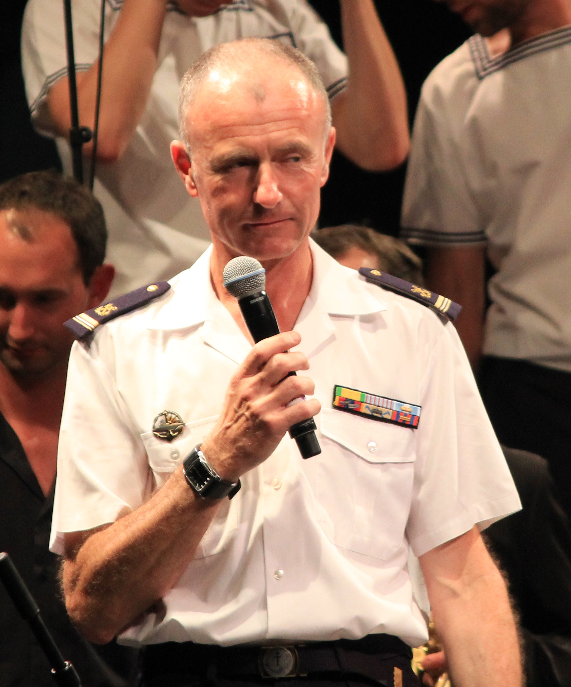 Le Bagad de Lann-Bihoué lors du concert celebrant son 60e anniversaire, organisé dans le cadre du festival interceltique de Lorient 2012.